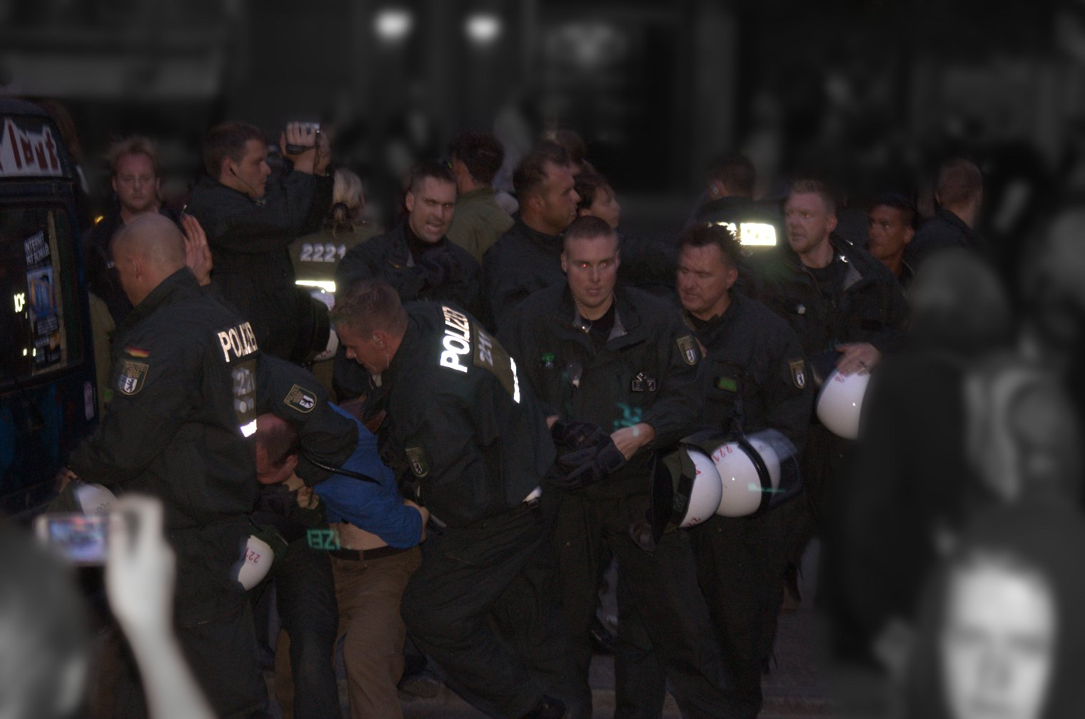 Festnahme am Rande der Freiheit-statt-Angst-Demonstration in Berlin.